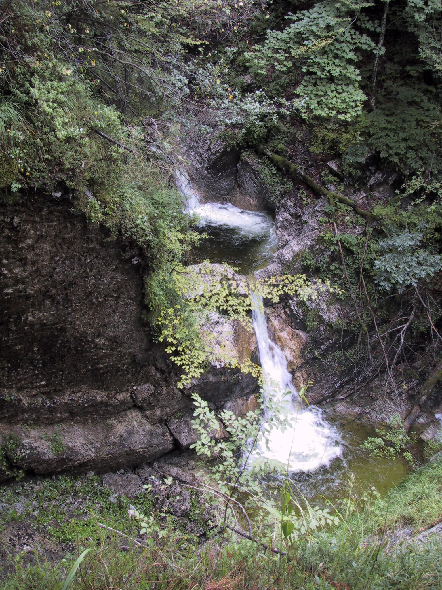 Latvice na Fratarici